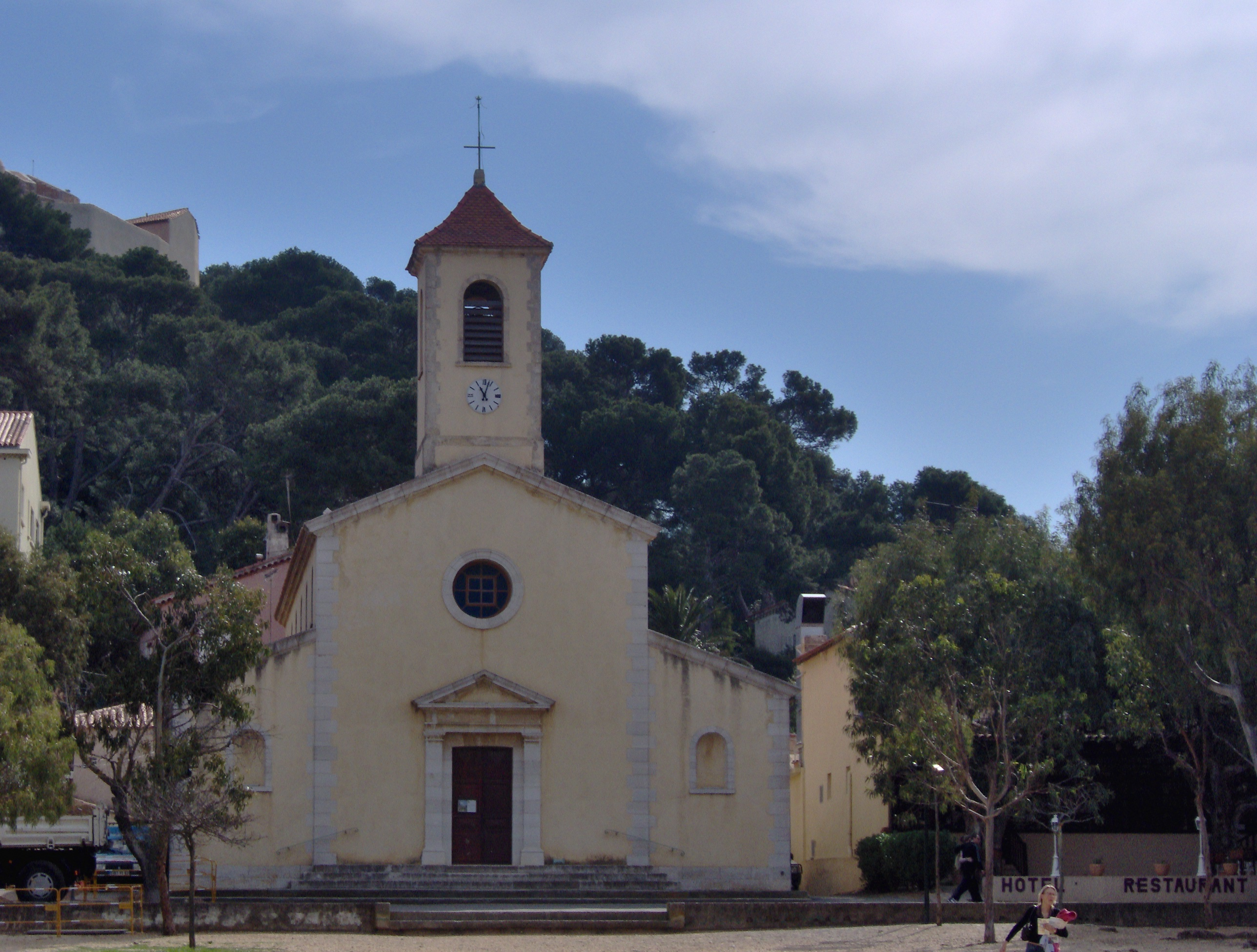 Church, Porquerolles, Îles d'Hyères